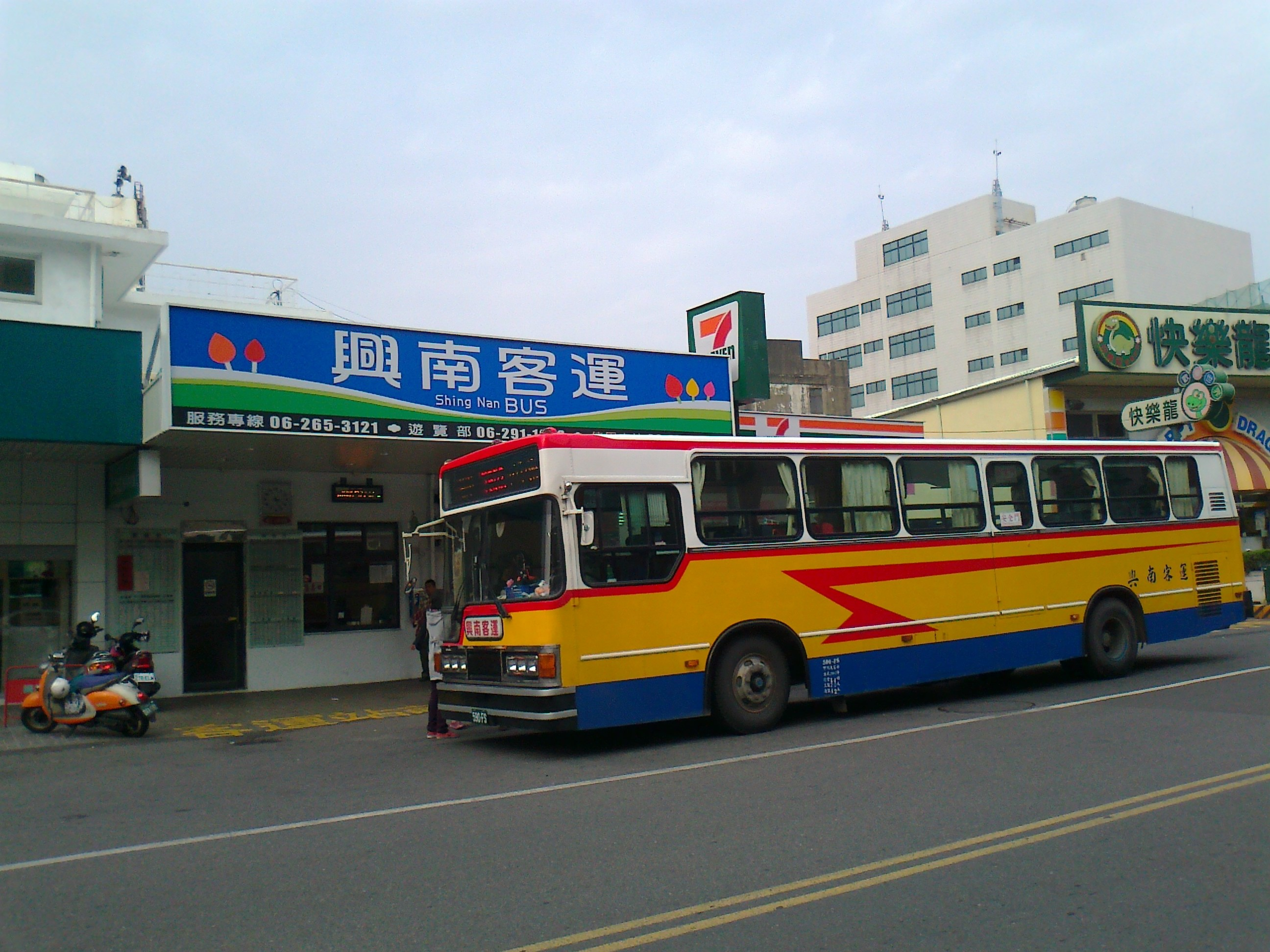 興南客運佳里站，舊塗裝的590-FS正到站